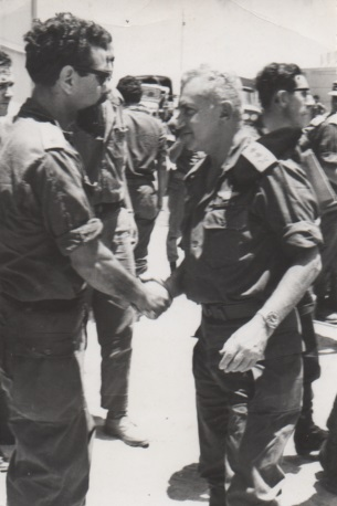 ראש המטה הכללי רא"ל חיים בר-לב מודה לשאול סלע בביקור ביחידה 1970